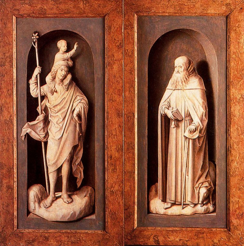 Closed view